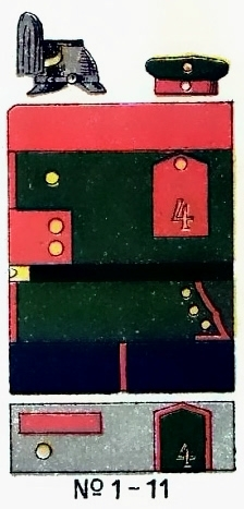 preußische Jäger-Uniform